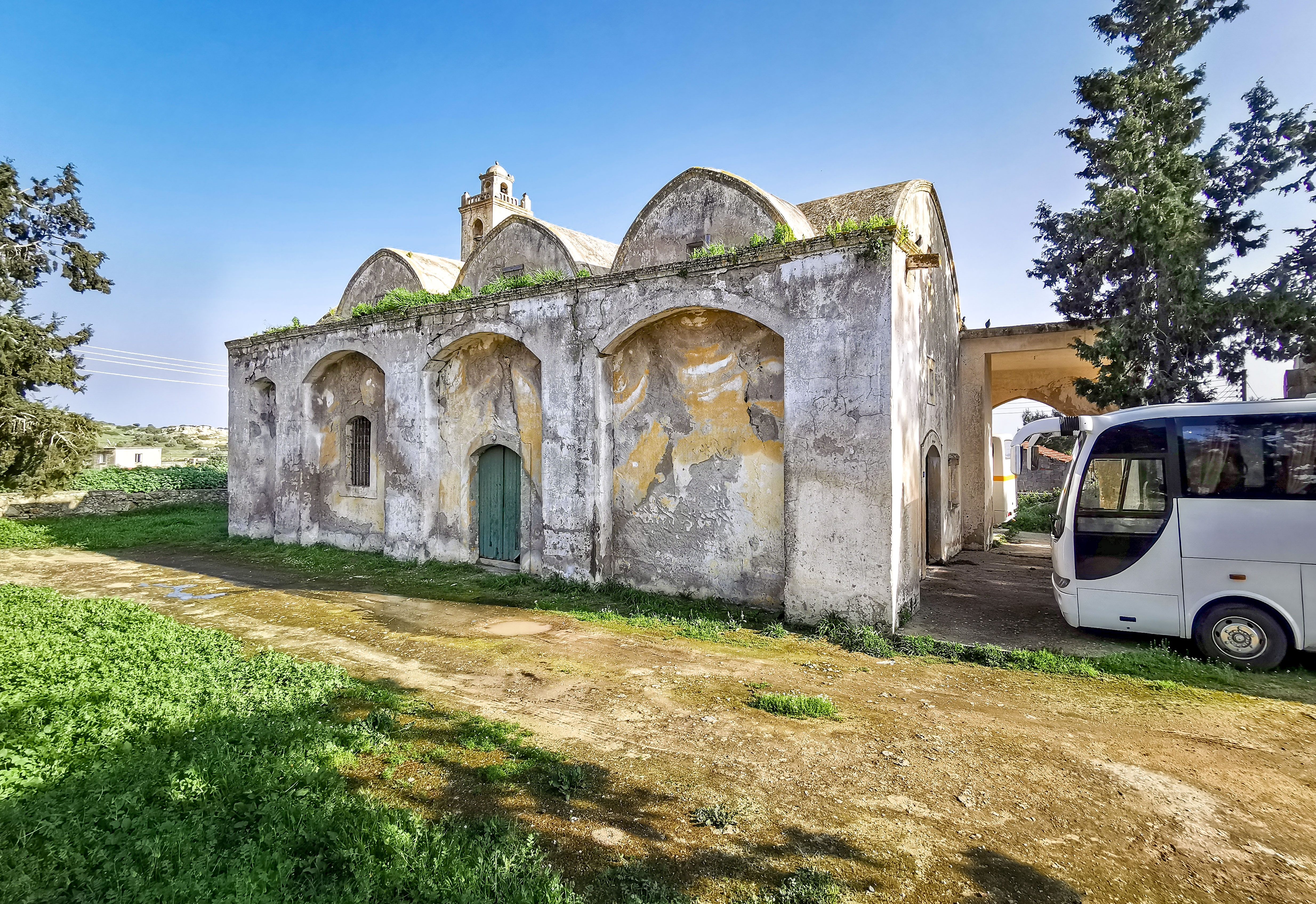 Diese ehemalige russisch-orthodoxe Kirche in Vokolida/Bafra auf Zypern dient heute nicht mehr als Gotteshaus.